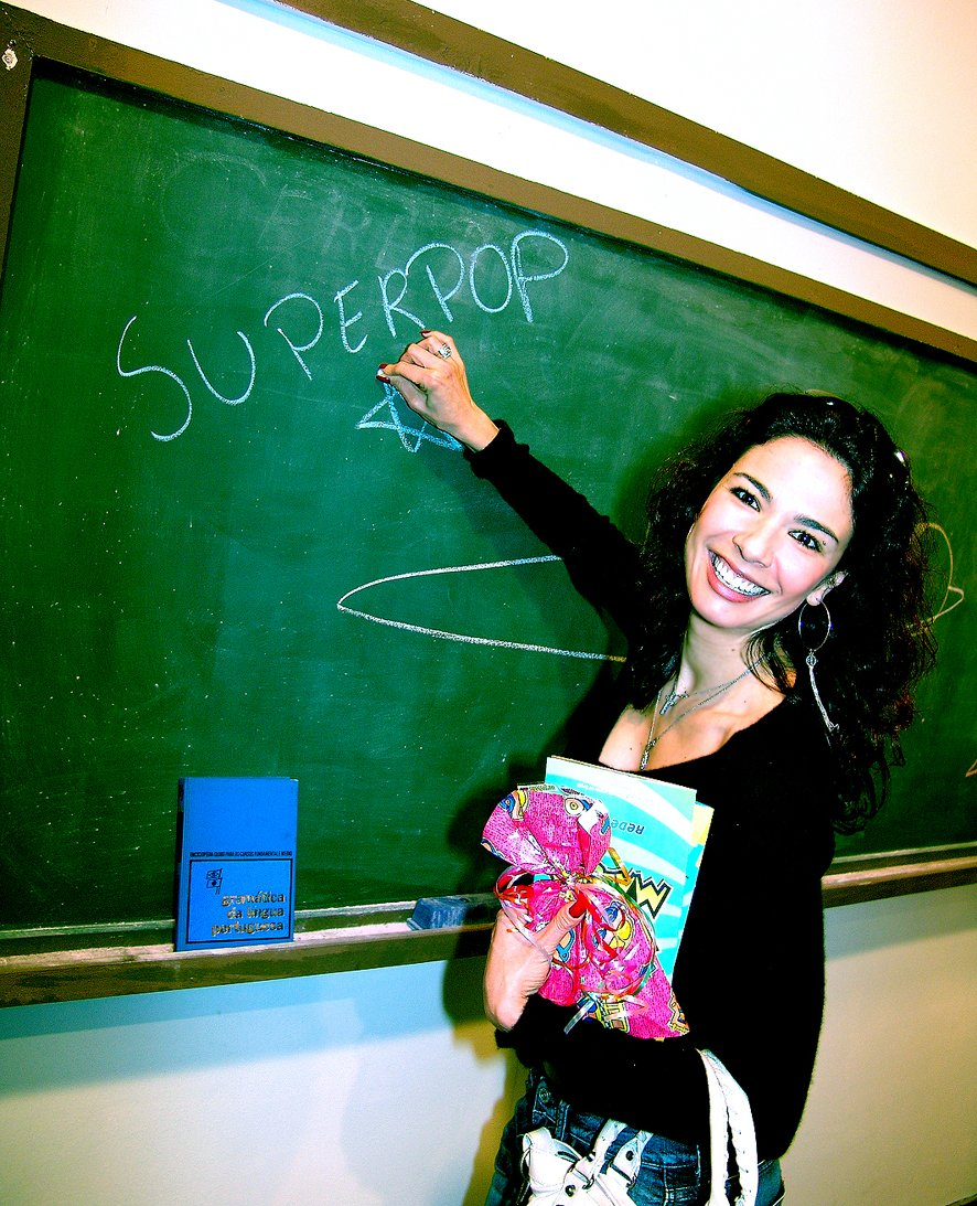 Brazilian TV Hostest Luciana Gimenez.